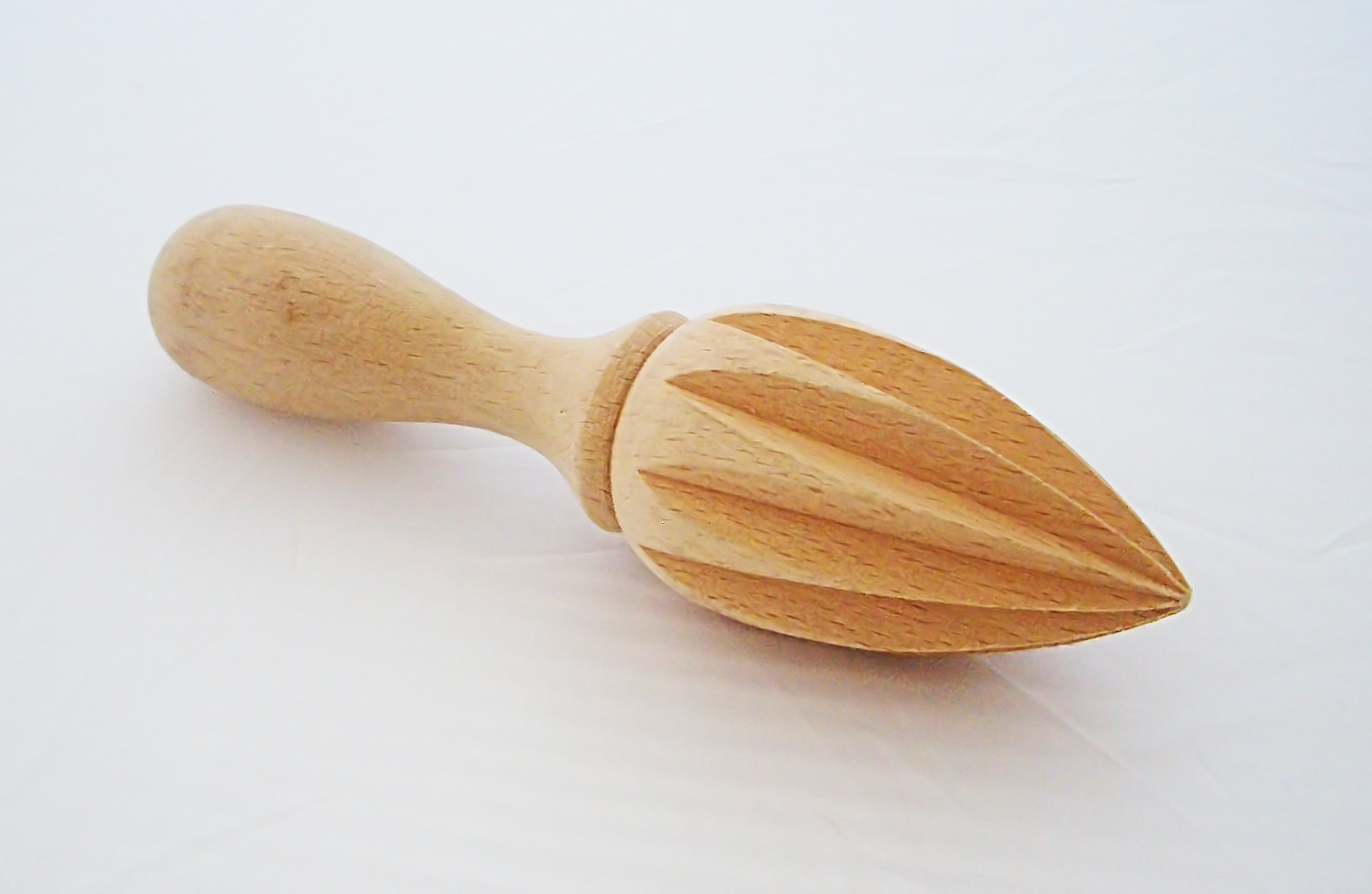 wooden lemon squeezer